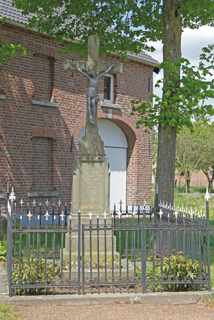 Wegkreutz in Vossem